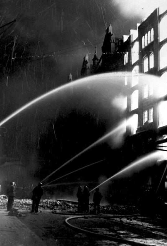 Hamburg, Löschen nach Luftangriff ADN-ZB/Archiv II.Weltkrieg 1939-45 Nach einem britischen Luftangriff auf Hamburg wird versucht, brennende Gebäude zu löschen, 4.2.1943 Bildberichter: Walther